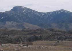 Cerro de las Empanadas (2106m) desde los Campos de Hernan Perea.